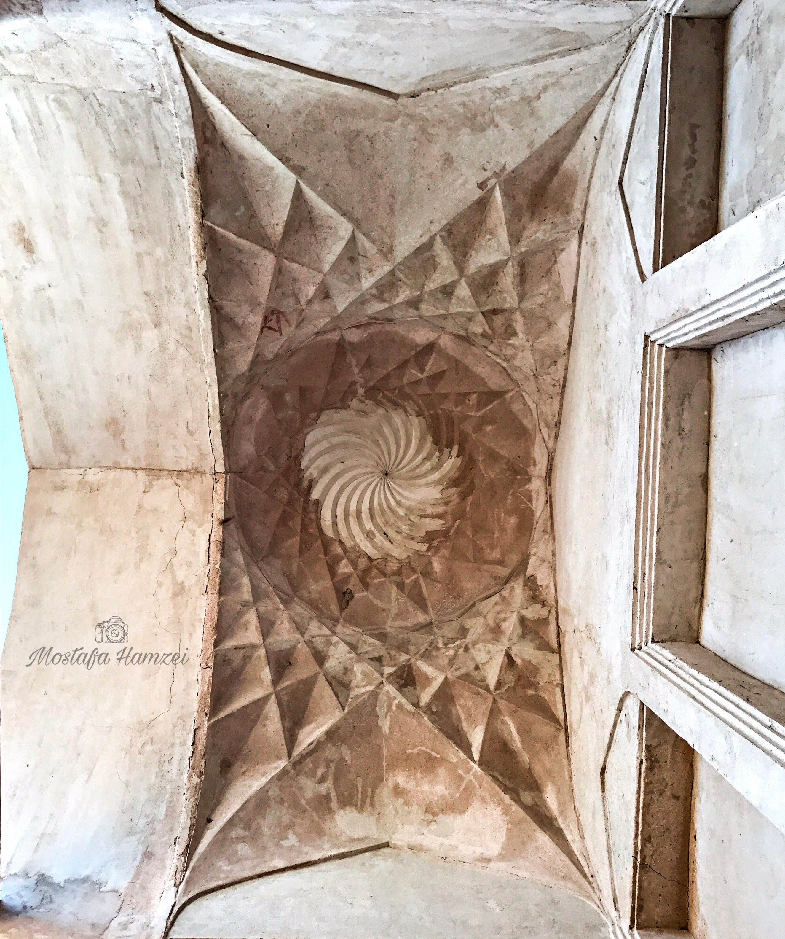 ویژگی معماری